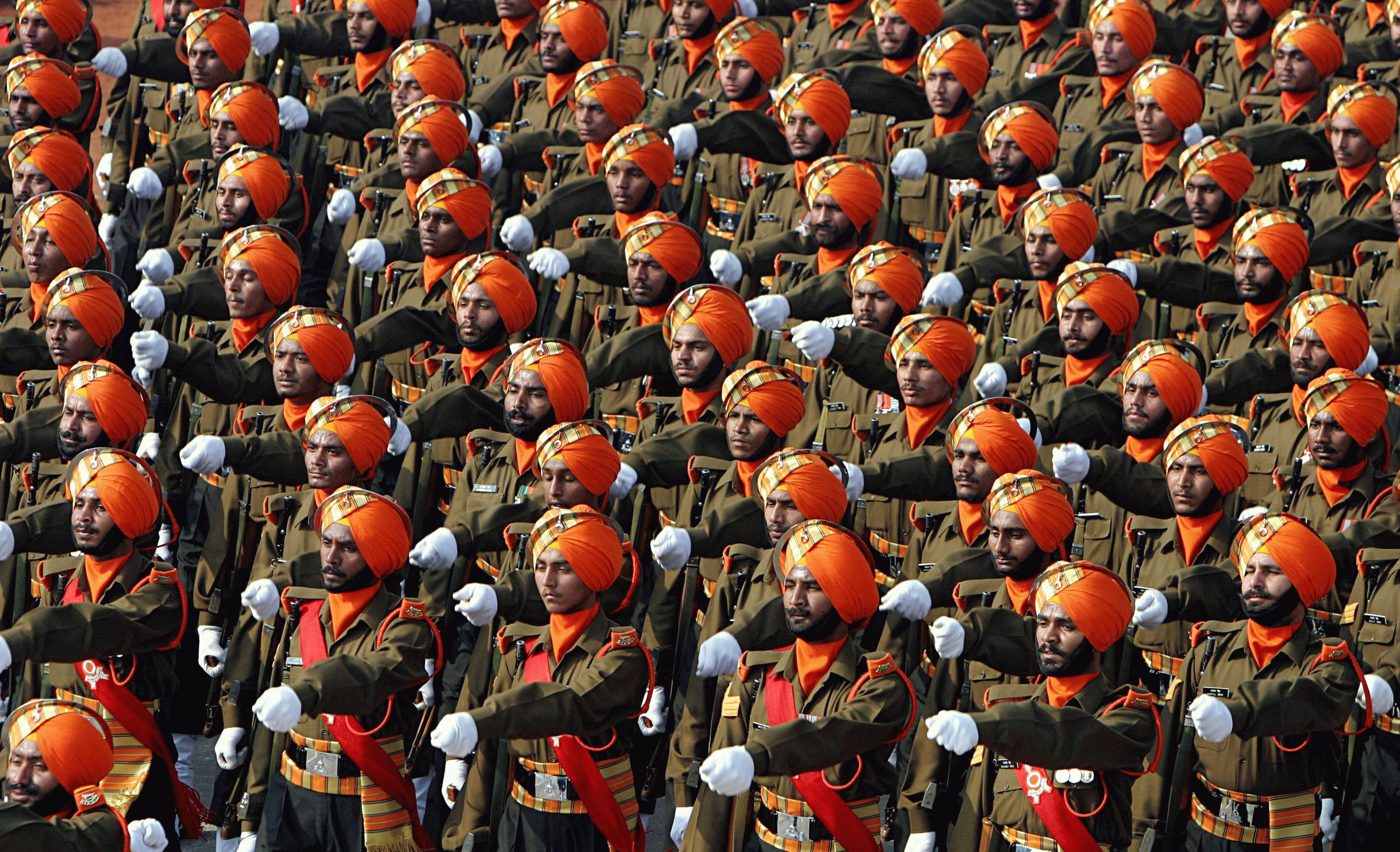 Nova Délhi (Índia) - Desfile do Dia da República, na Rajpath.